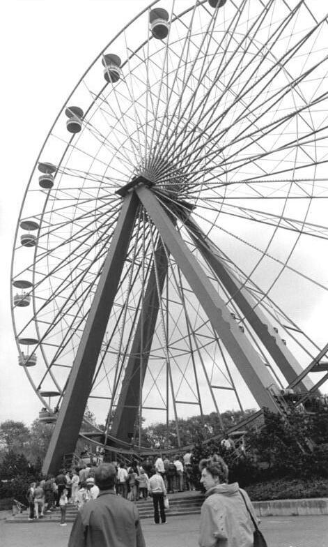 "ADN-ZB-Zimmermann-30.7.87-Berlin: Stadtbezirk Treptow - Kulturpark - Der Kulturpark Berlin im Plänterwald bietet den Besuchern Freude und Entspannung. Zu seinen Attraktionen gehört das 43 Meter hohe Riesenrad, in dessen 36 Gondeln über 200 Personen eine ""Luftreise"" antreten können. -siehe auch 1987-0730-1N, 2N, 4N - 6N-"